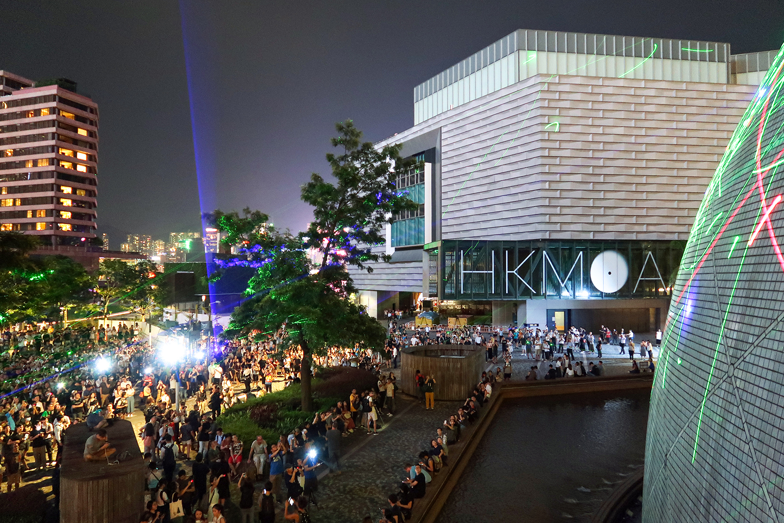 HK laser pen protest